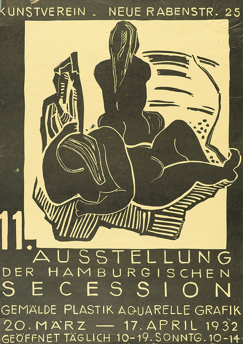 Ausstellungsplakat von Kurt Löwengard der 11. Ausstellung der Hamburgischen Secession im Kunstverein in Hamburg